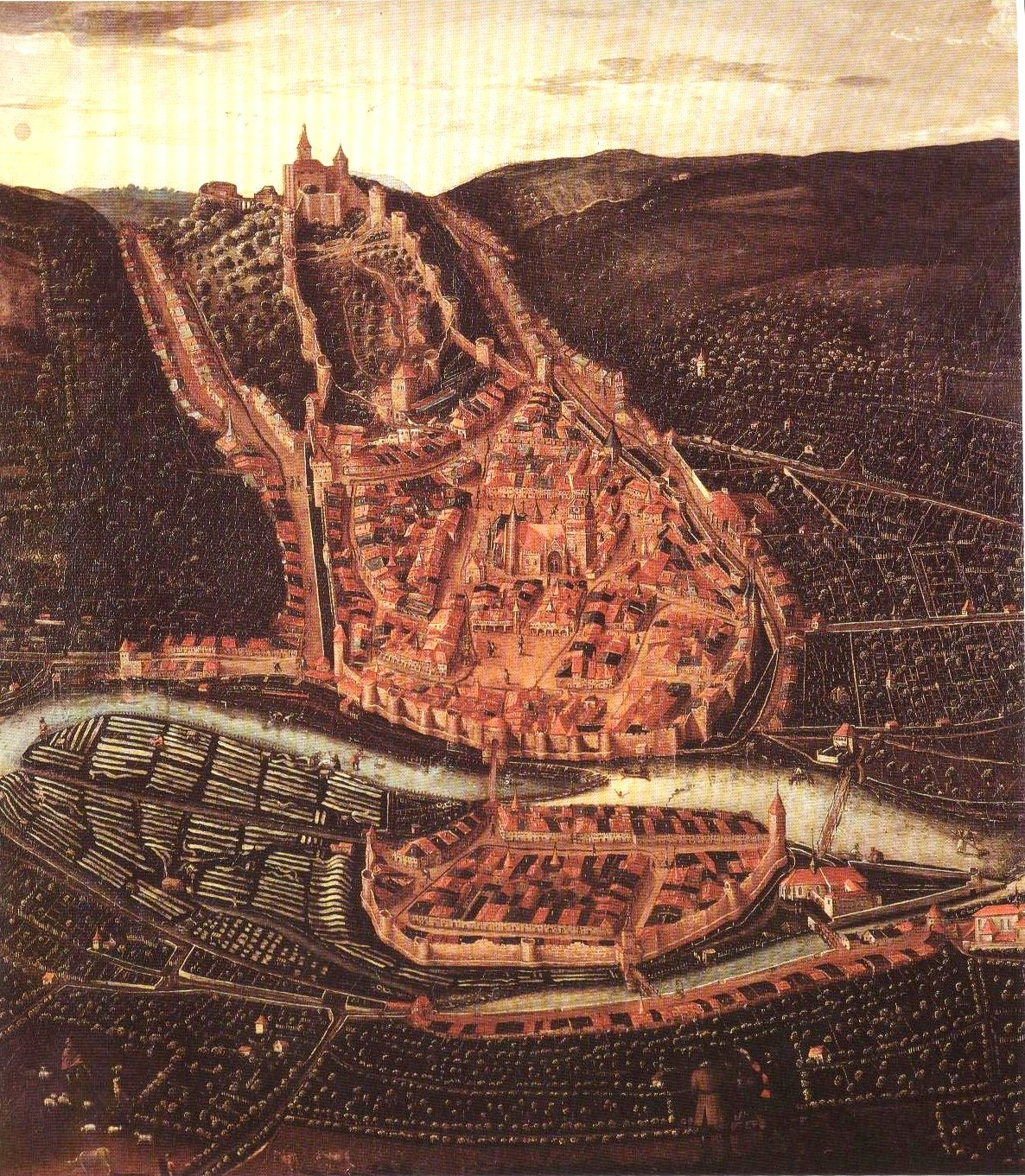 plan général d'Épinal en 1625, réalisation de Nicolas Bellot, notice Base Mérimée[1]